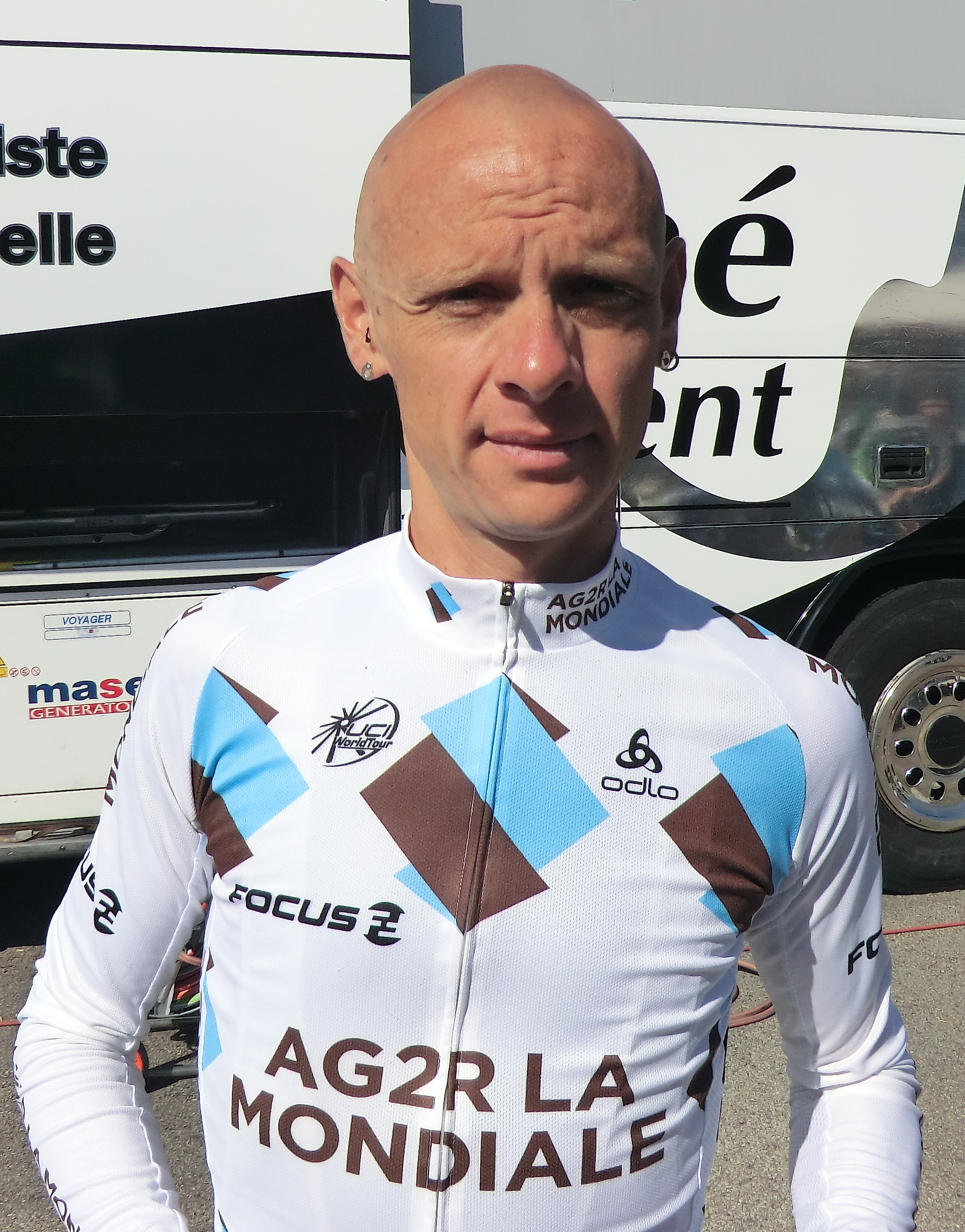 Coureurs à l'échauffement au matin du prologue du tour de l'Ain 2013, à l'hôtel Lyon-Est à Saint-Maurice-de-Beynost.